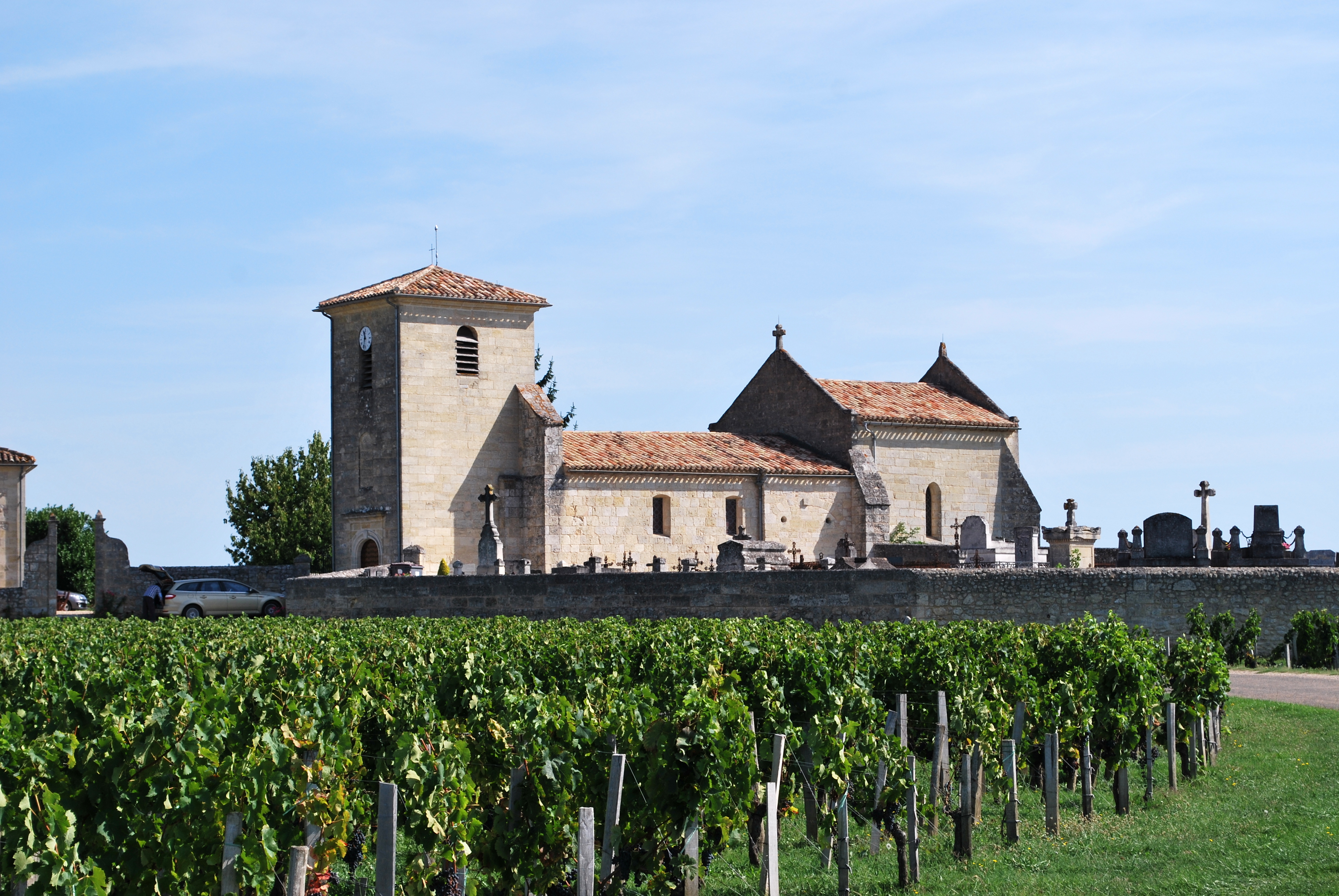 Saint-Hippolyte (Gironde) église